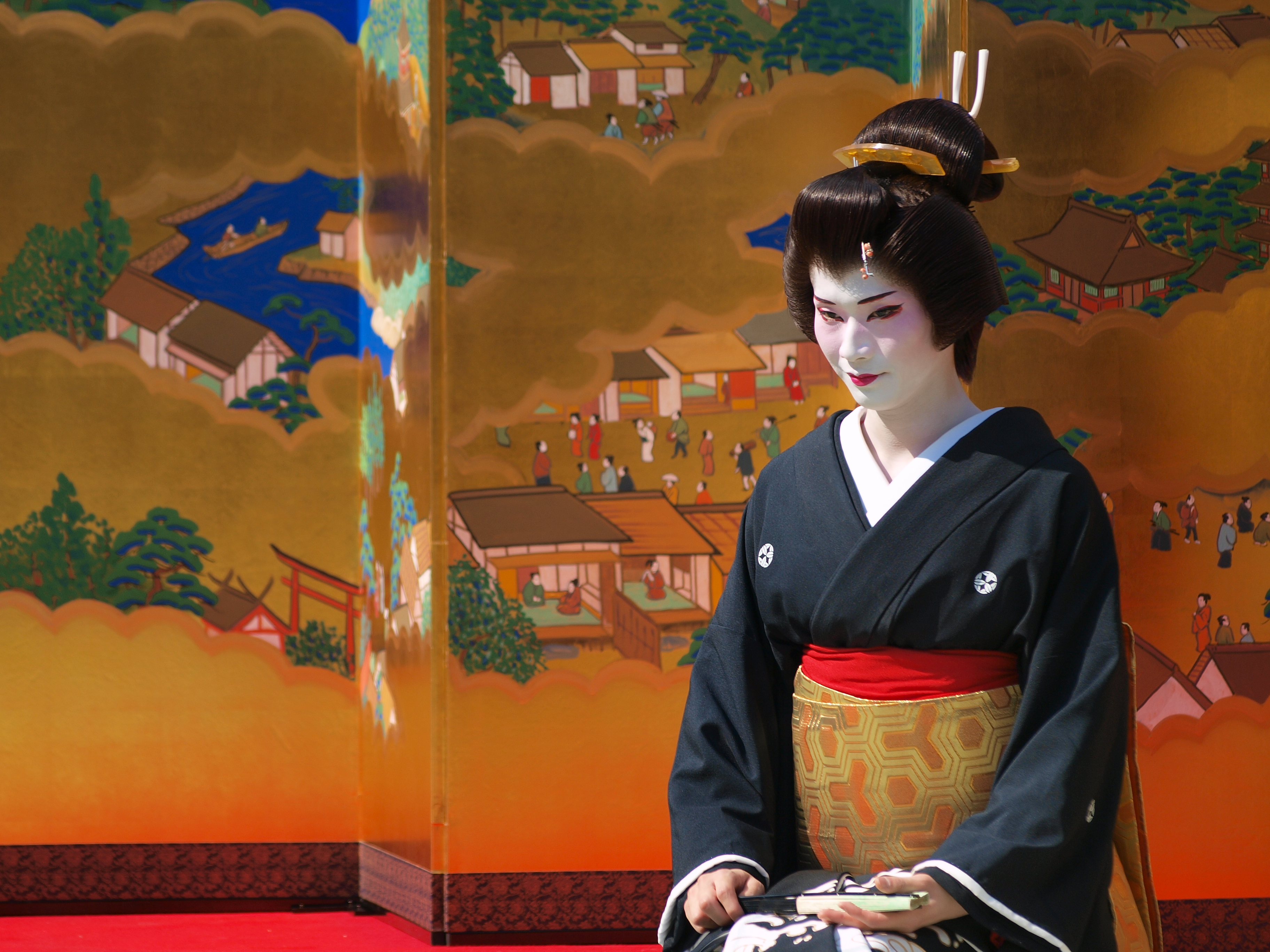 Male geisha (professional name Eitaro 栄太郎) at Asakusa